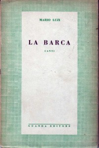 Couverture de la première édition du recueil "La Barca" en 1935.